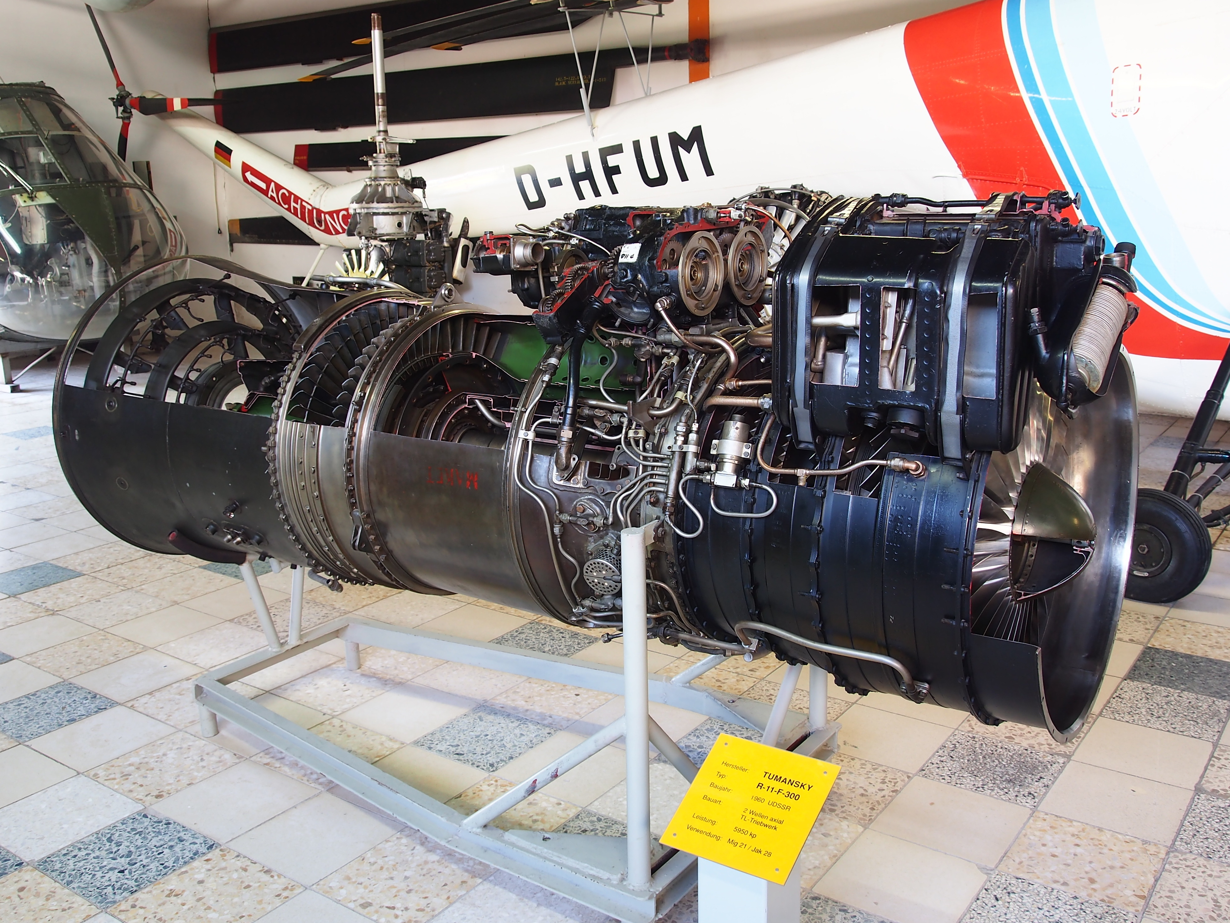 Photographed at Hermeskeil.